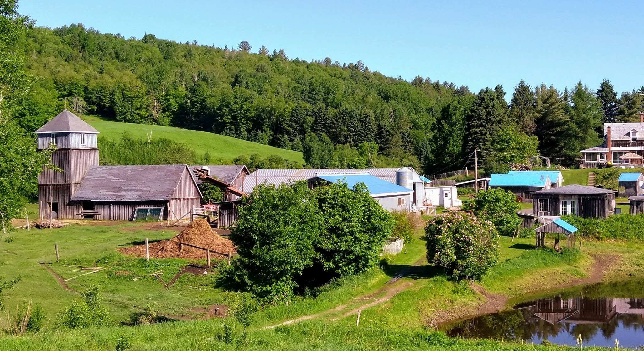 Ferme traditionnelle, sans production industrielle